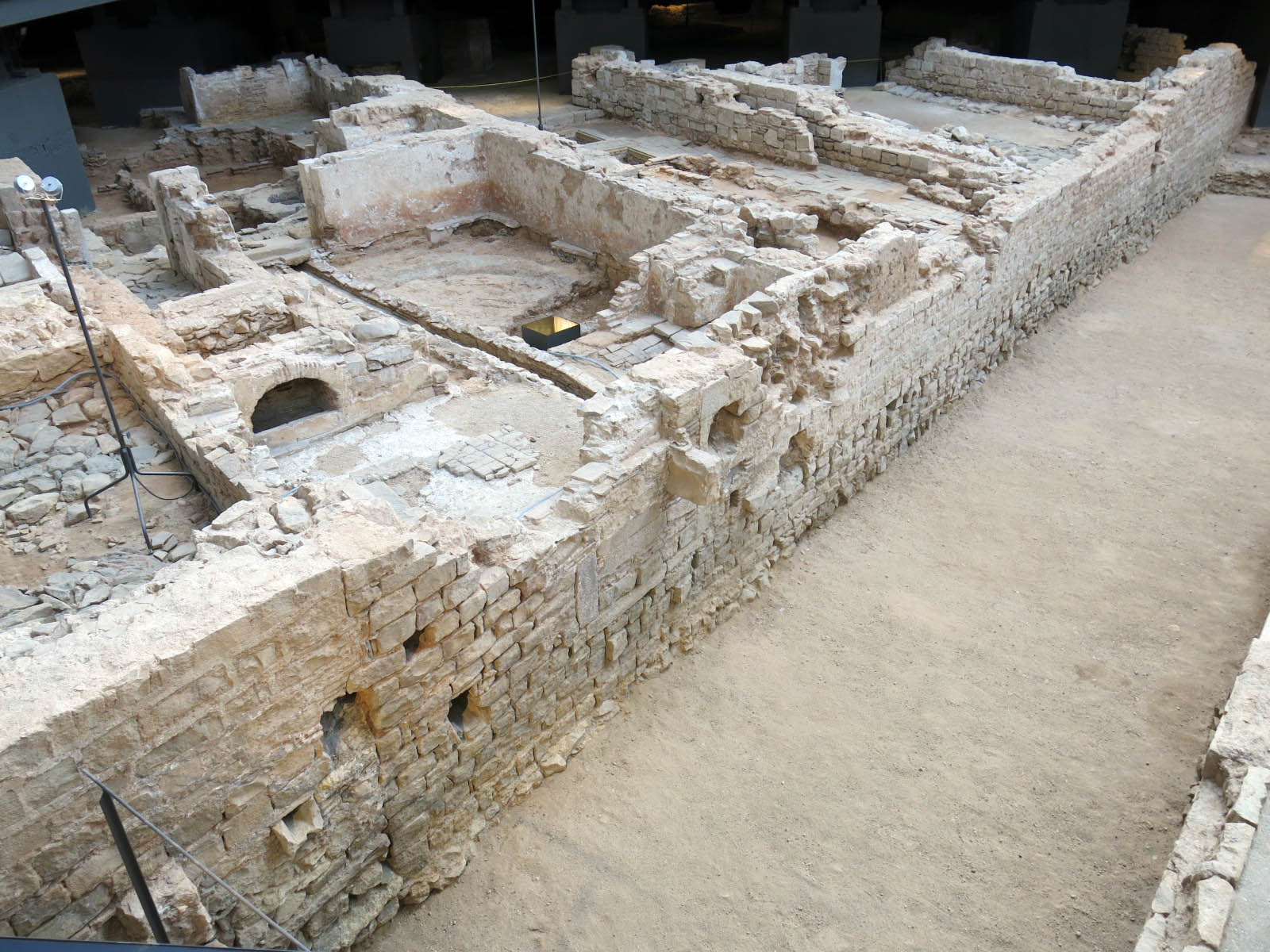 Mercat del Born (Barcelona). Rec Comtal davant la Casa Duran (N.17), amb accés pel carrer de Gensana Object location41° 23′ 08.76″ N, 2° 11′ 01.54″ E